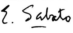 La firma de Ernesto Sabato